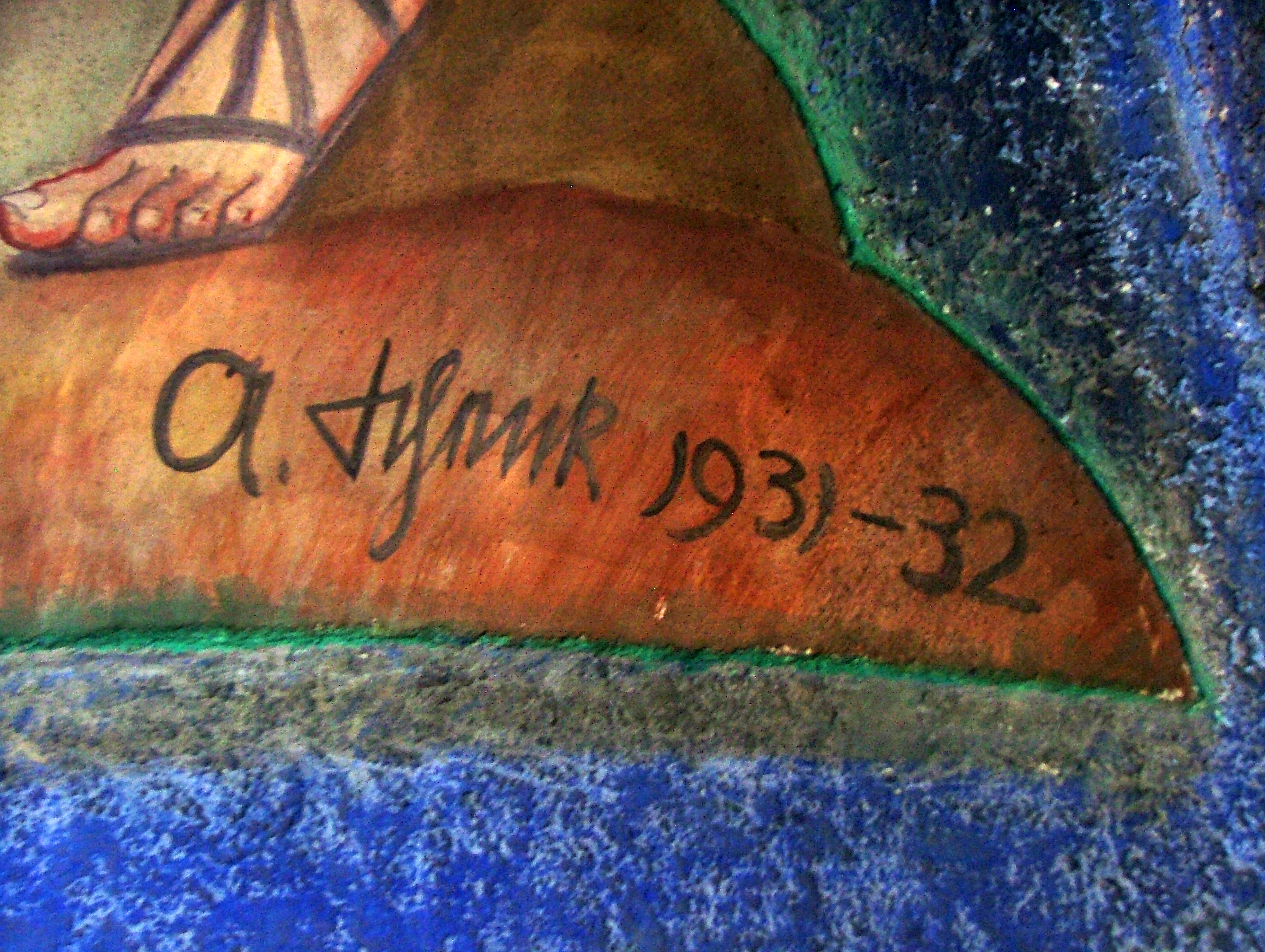 Maler Alois Schenk